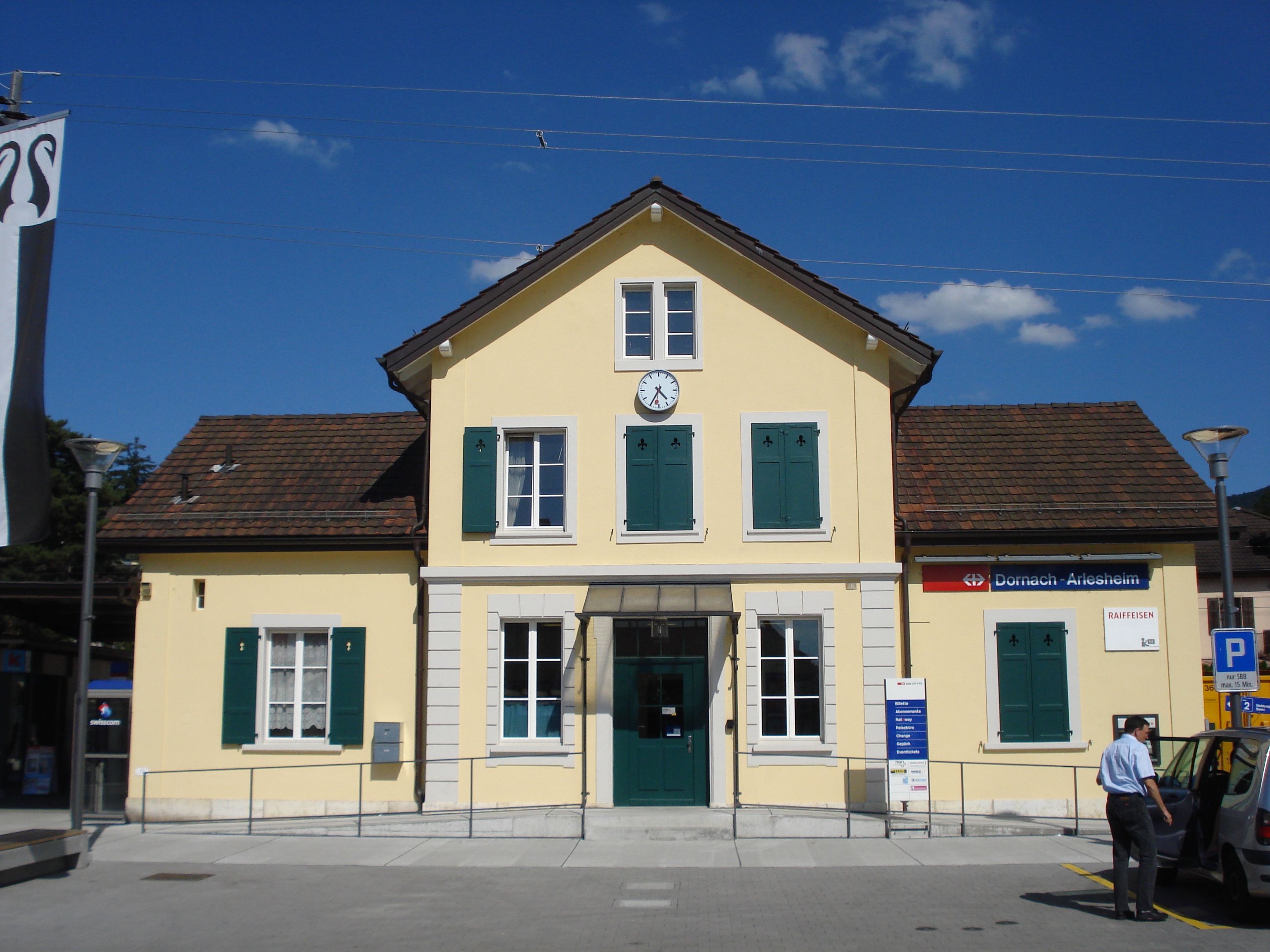 L'ancien bâtiment de la Gare de Dornach-Arlesheim.